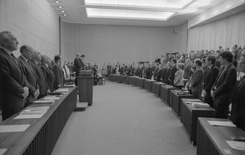 Bonn, 1. Dezember 1989 Bundesratssitzung, Die Mitglieder des Bundesrates gedenken des am 30. November 1989 von Terroristen ermordeten Vorstandssprechers der Deutschen Bank, Dr. Alfred Herrhausen.